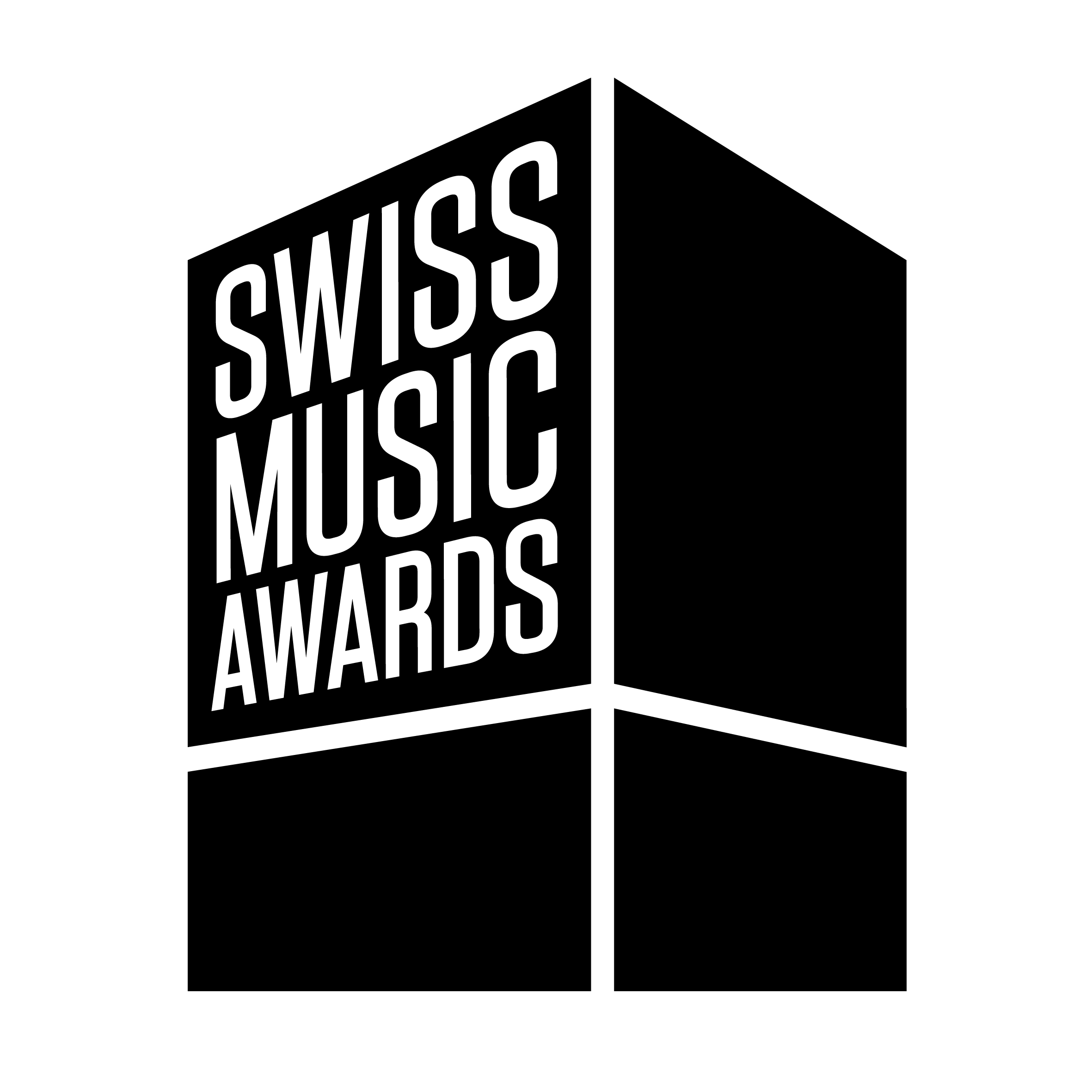 SMA 2017